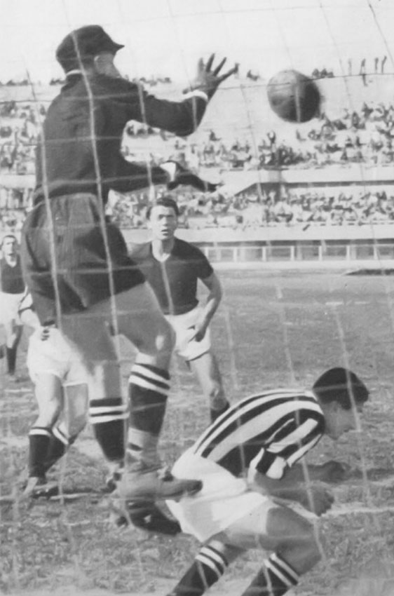 Torino, stadio Municipale Benito Mussolini, 8 maggio 1938. Il portiere della Juventus, Alfredo Bodoira, sventa in uscita un attacco del Torino nel corso della vittoriosa finale di ritorno (2-1) della Coppa Italia 1937-38; alle sue spalle, il compagno di squadra Alfredo Foni. Si trattò del primo successo nella competizione per la Juventus, nonché della prima finale di Coppa Italia assegnata in una stracittadina (Torino).